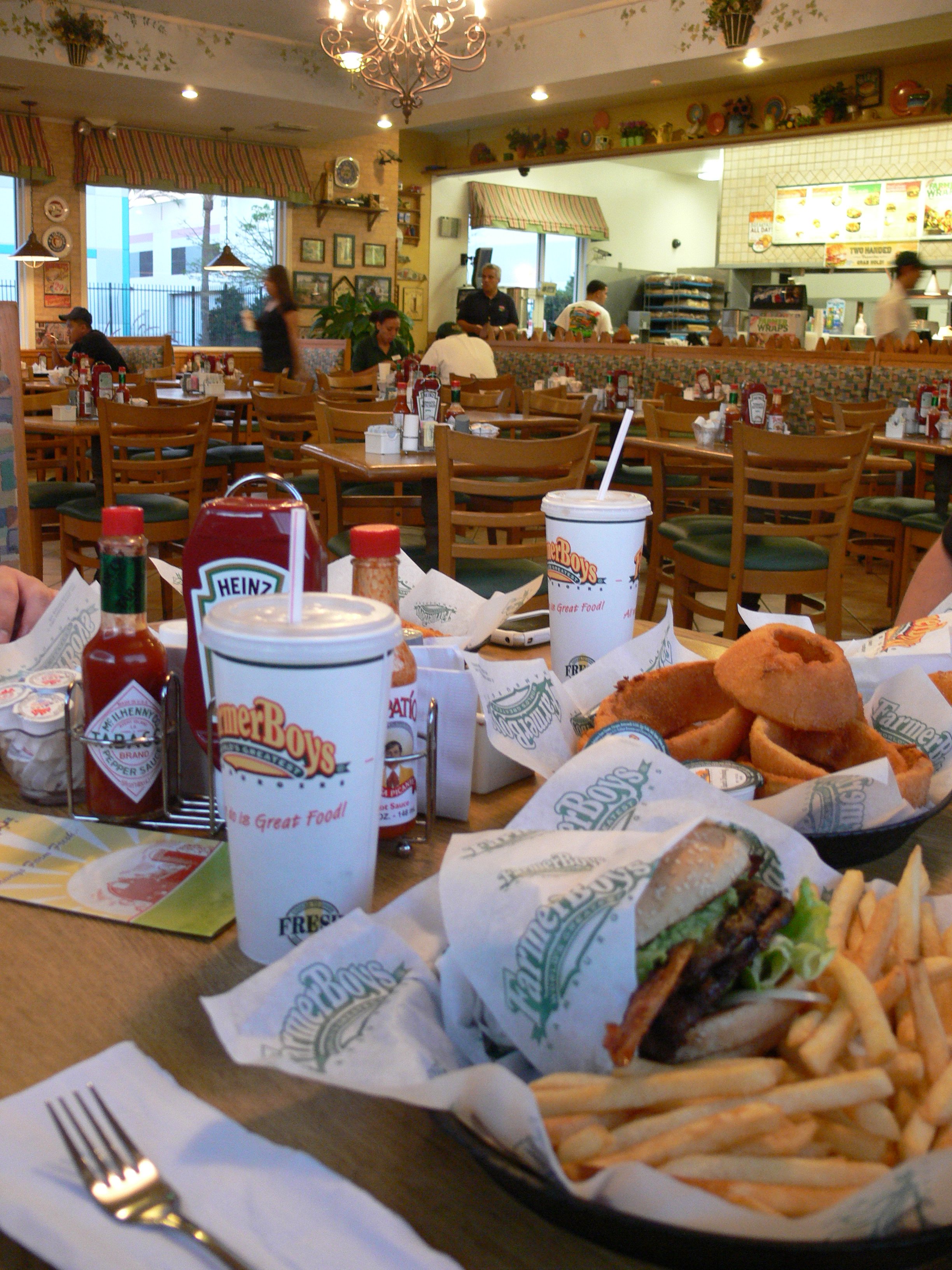 Inside Farmer Boys restaurant, 726 S. Alameda, Los Angeles, California